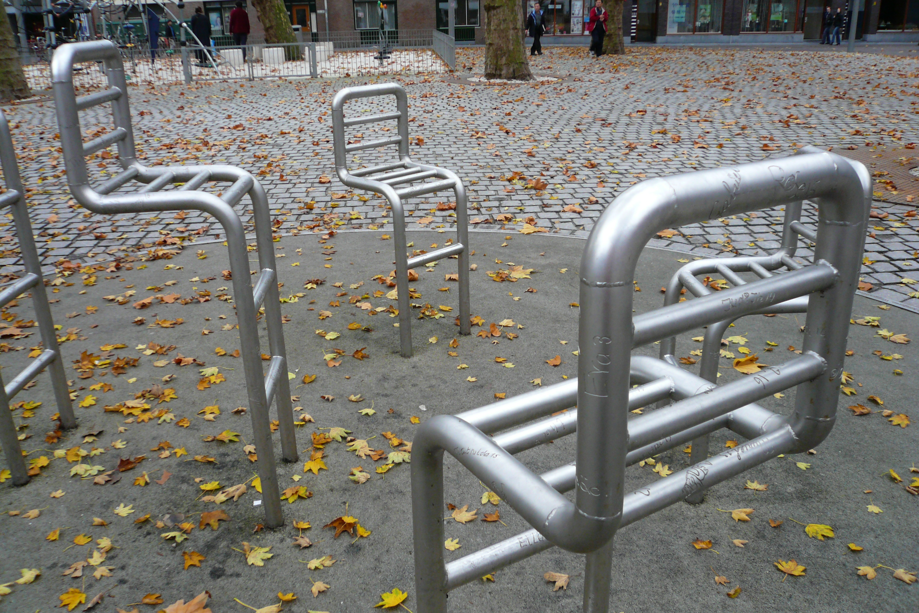 Monument op Rabbijn Maarsenplein